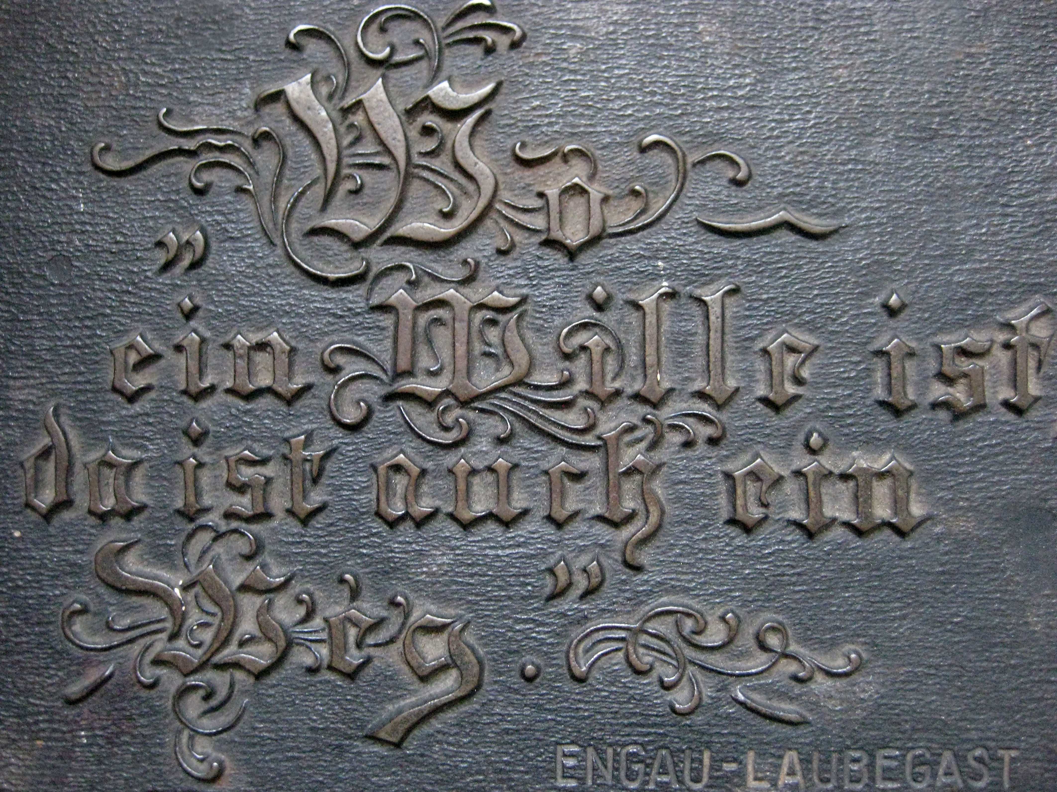 Bronze Schild - von Otto Engau in Laubegast mit der Aufschrift - Wo ein Wille ist - da ist auch ein Weg_Image_0001_Luous in Saxonia - Germany